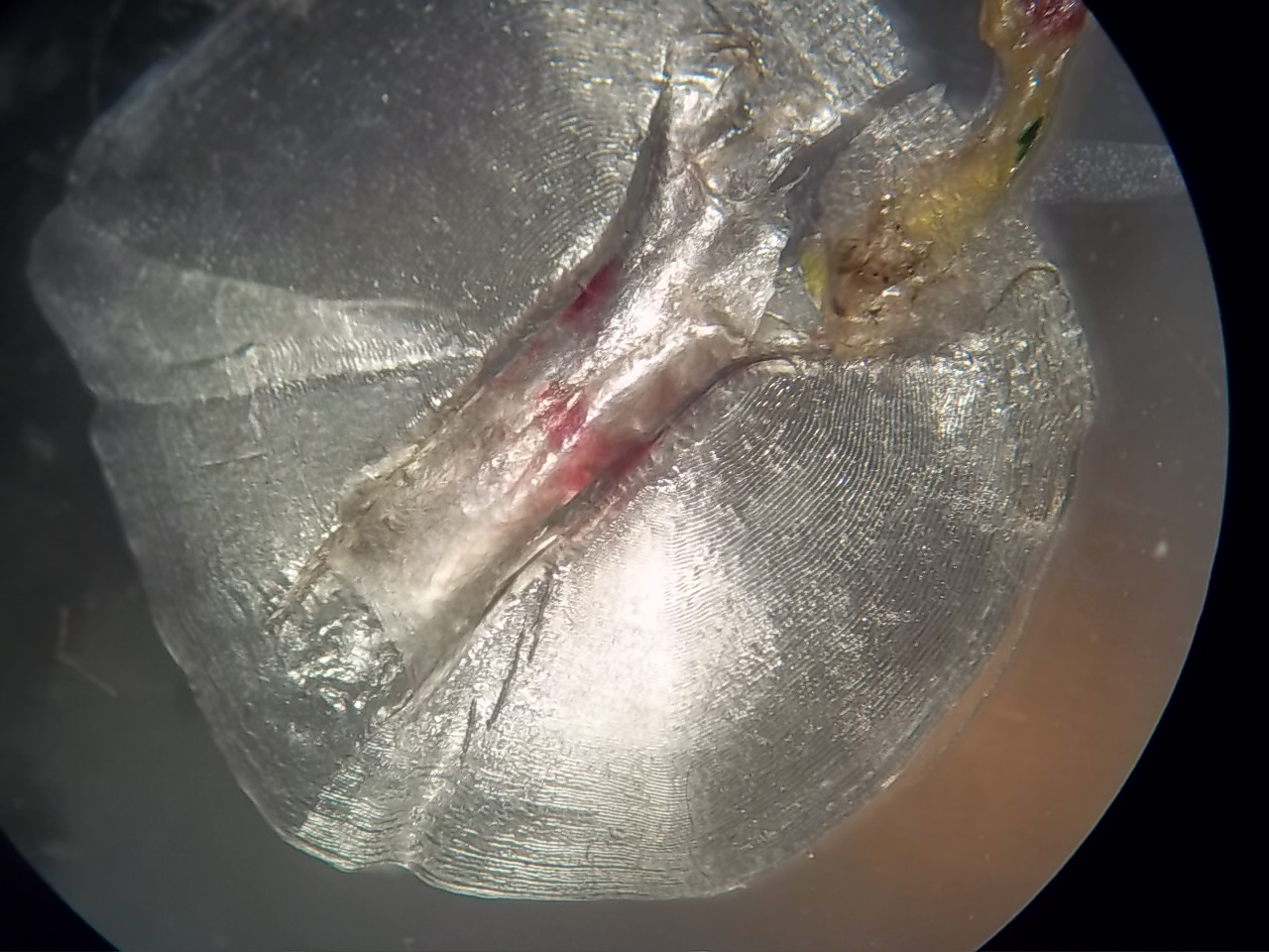 Imagen con lupa binocular (2X) de una escama cicloide de la línea lateral de una Pescadilla (Merluccius hubbsi).